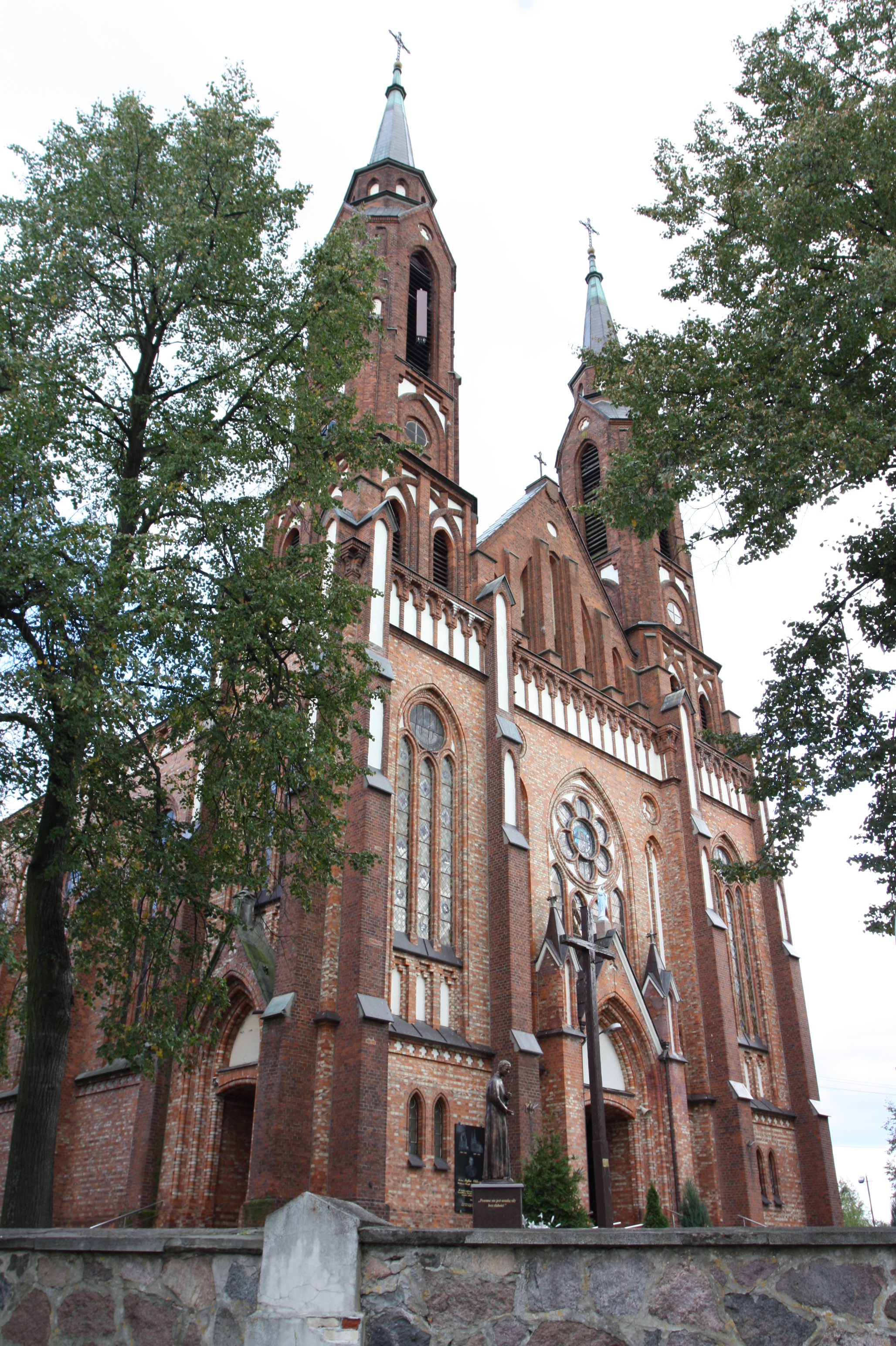 Sadowne, kościół par. pw. św. Jana Chrzciciela, 1906-1909, 1948-1950